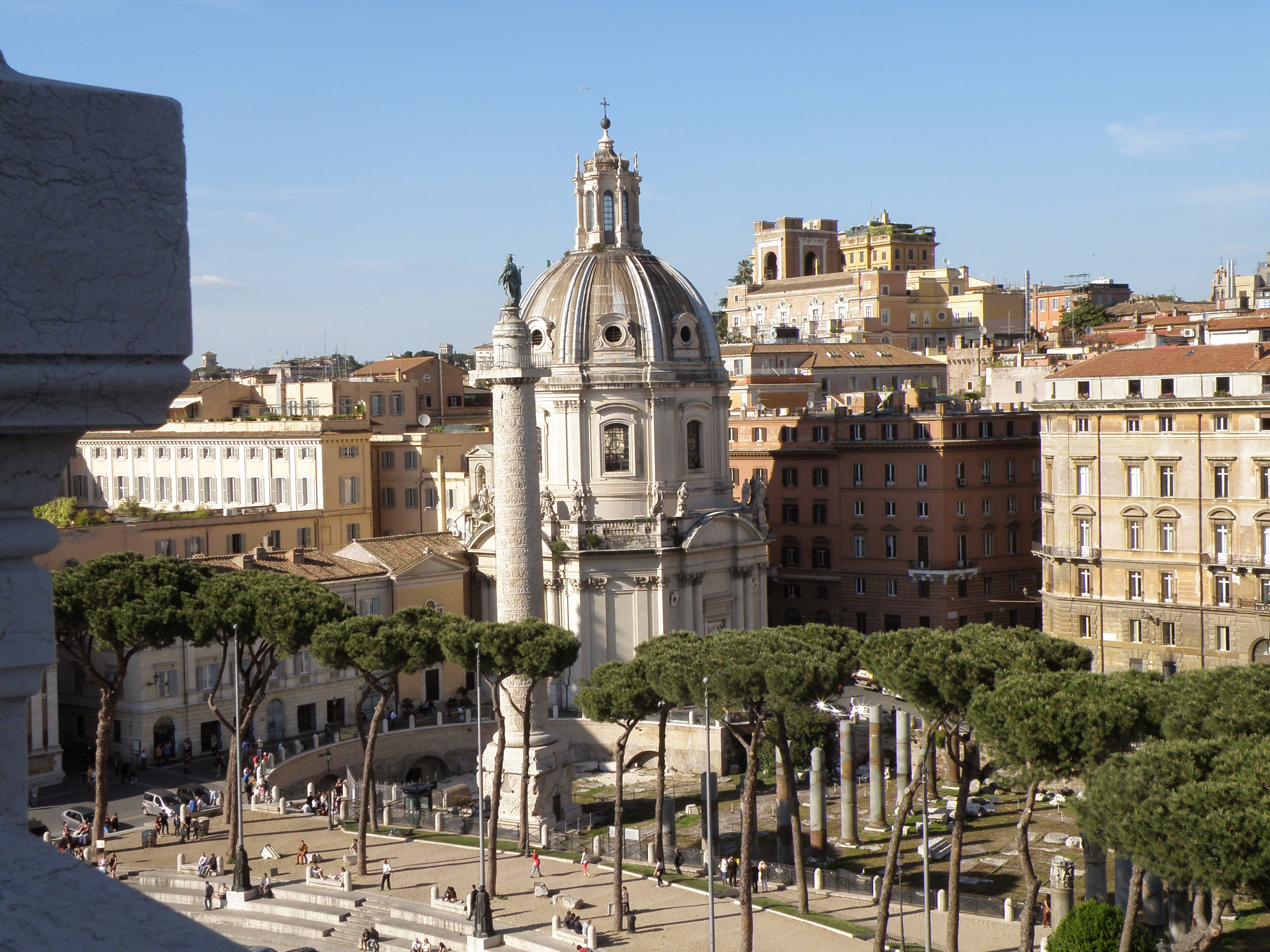 Rione X Campitelli, 00186 Roma, Italy